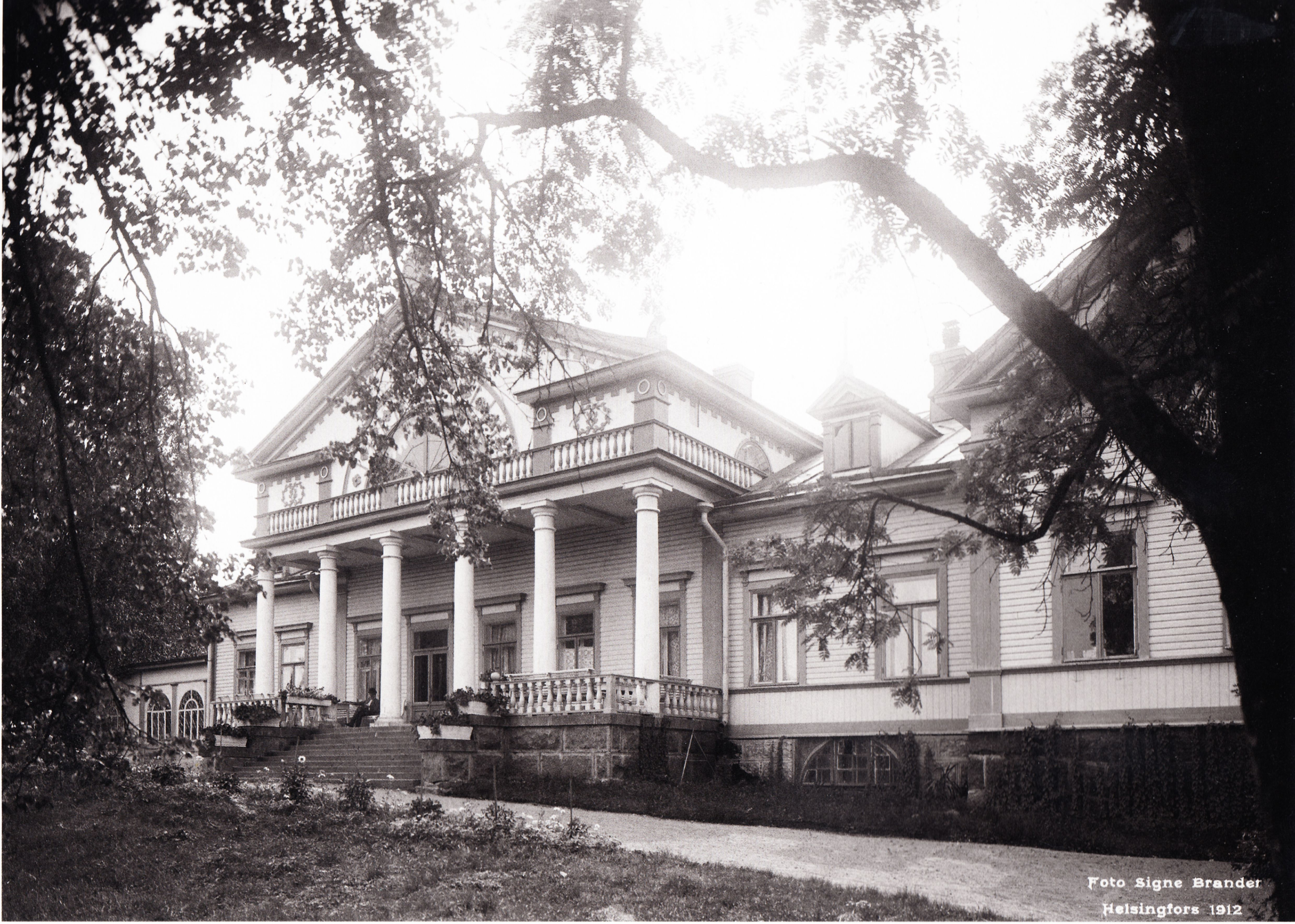 Kiiskilän kartano